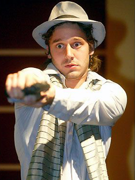 El actor chileno Benjamín Vicuña interpretando a Jean en la obra de teatro Splendid's. Junio de 2004.